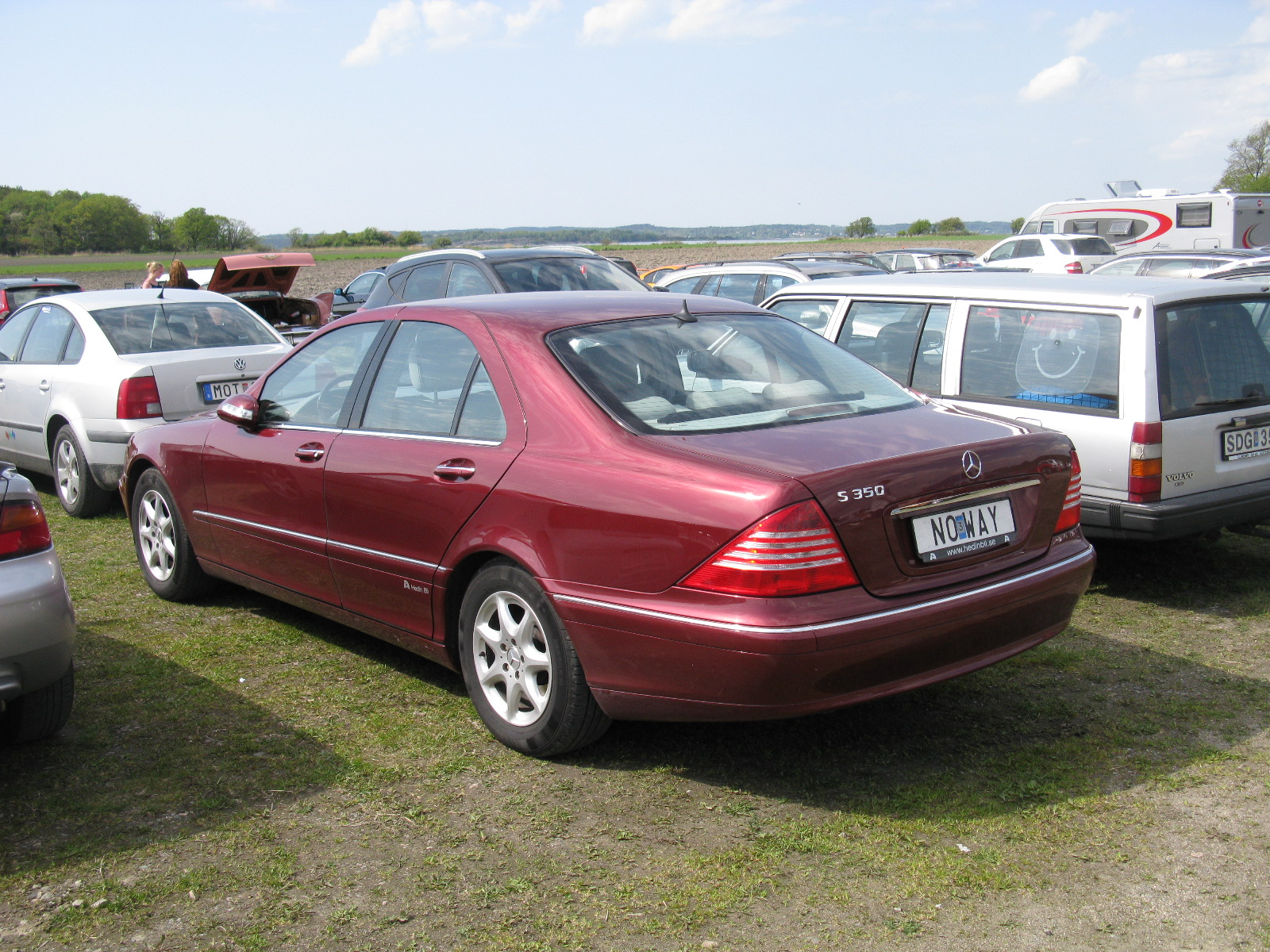 Mercedes-Benz S350 W220